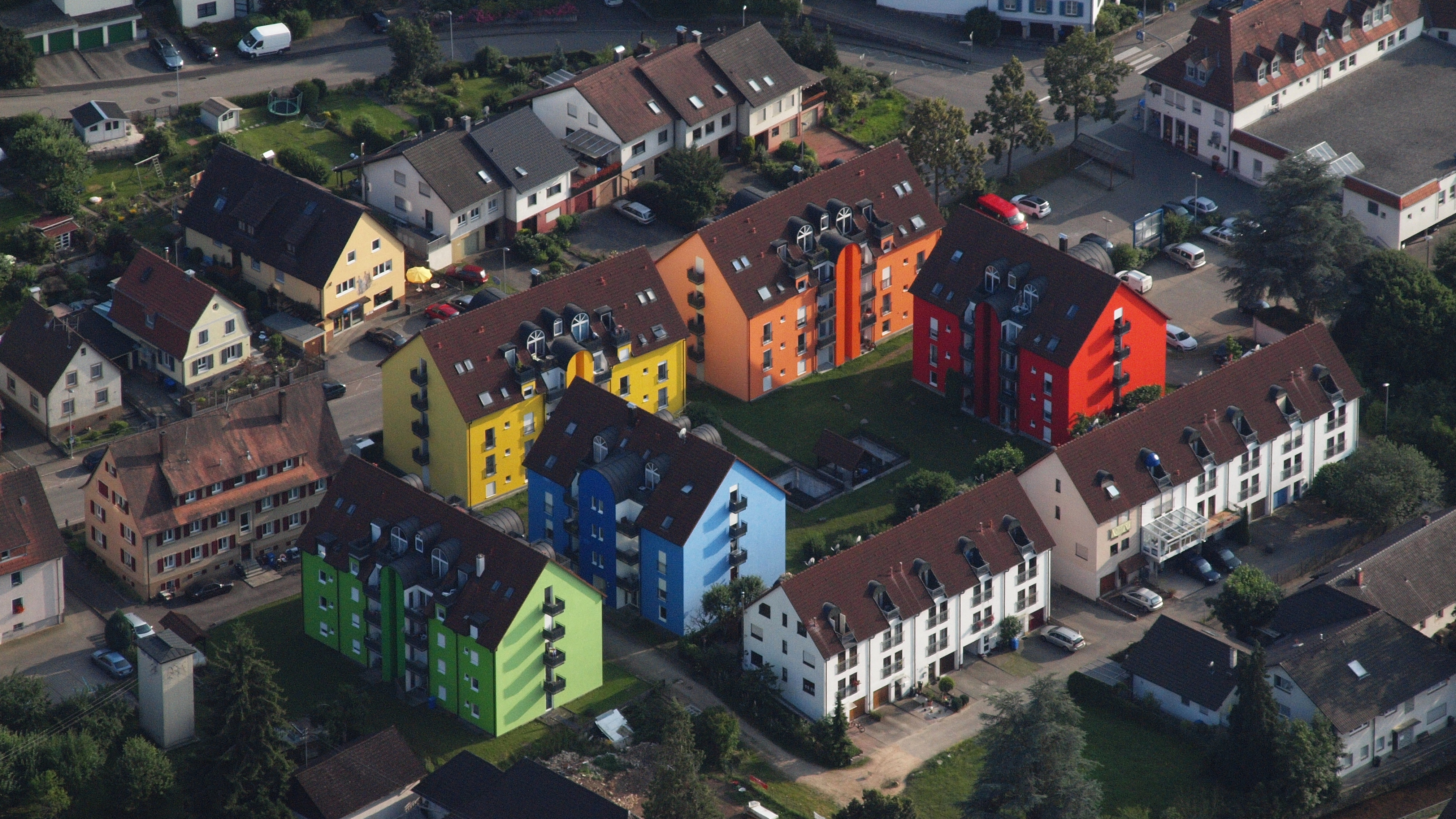 Kandern, Bereich Waldeckstrasse